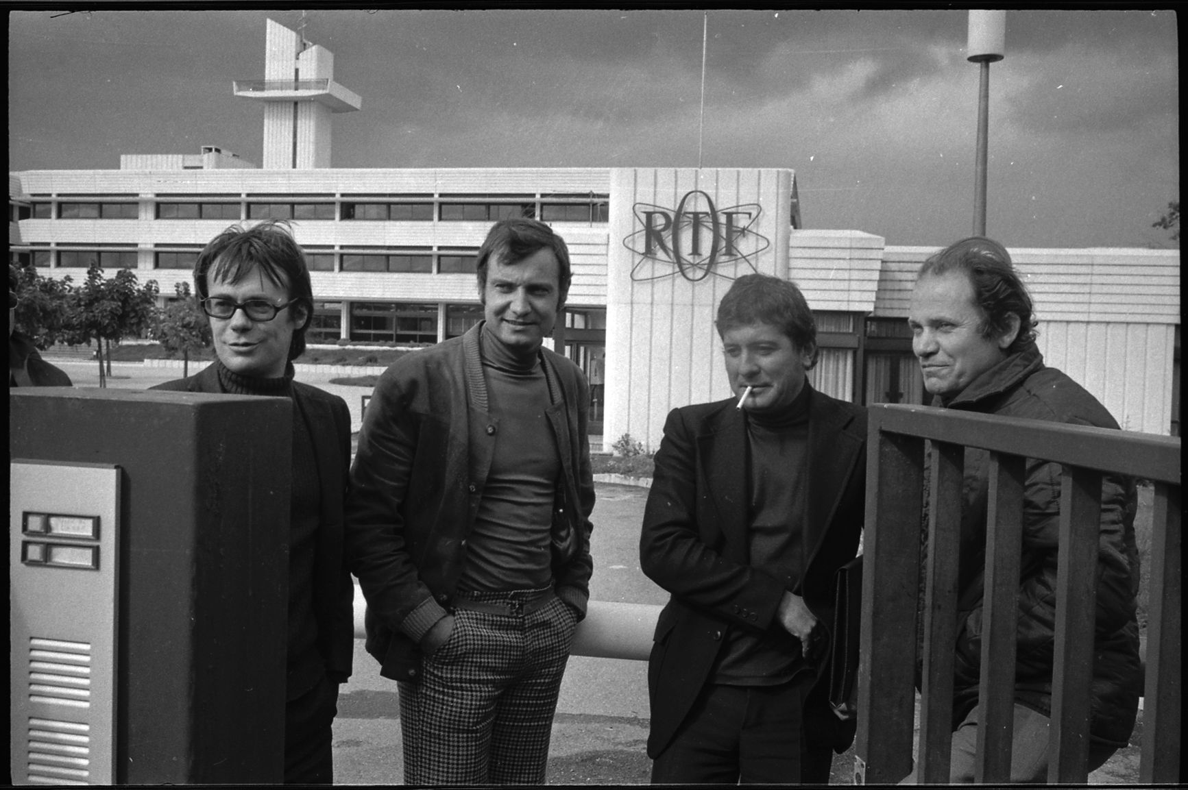 Aérospatiale. 24 Septembre 1974. Vue de quatre personnes devant le bâtiment de l'ORTF.